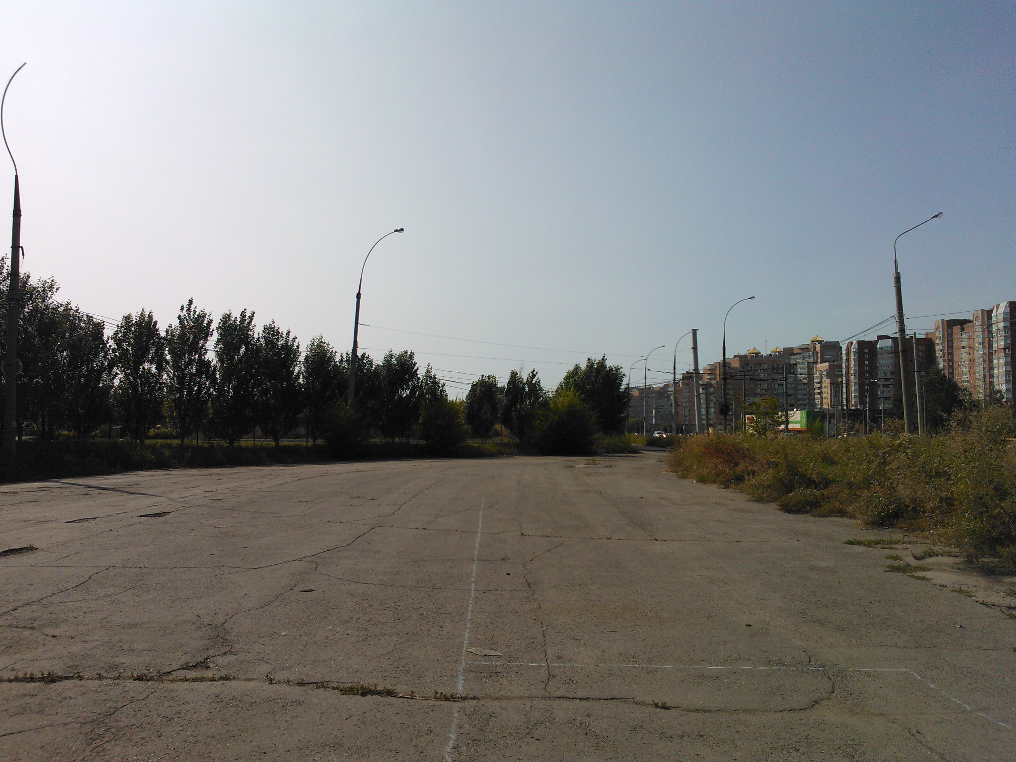 Бывшая диспетчерская "Набережная".